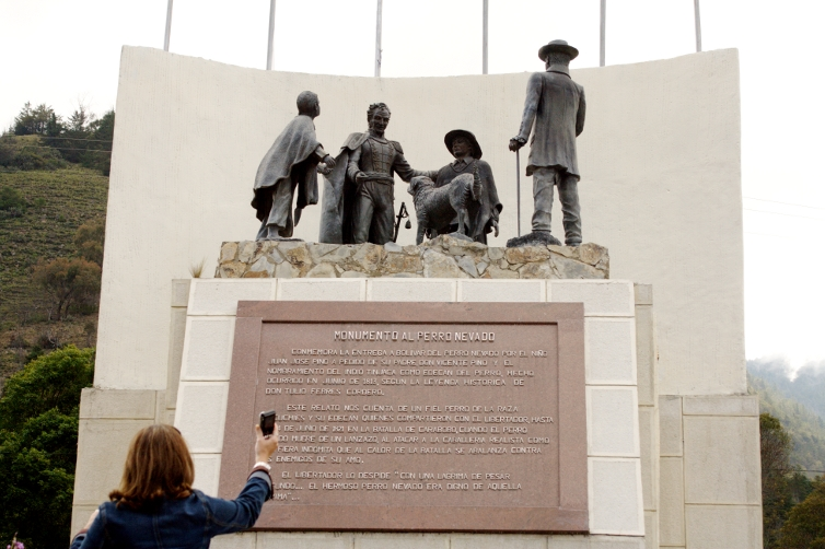 Monumento al perro nevado entre Barinas y Mérida.